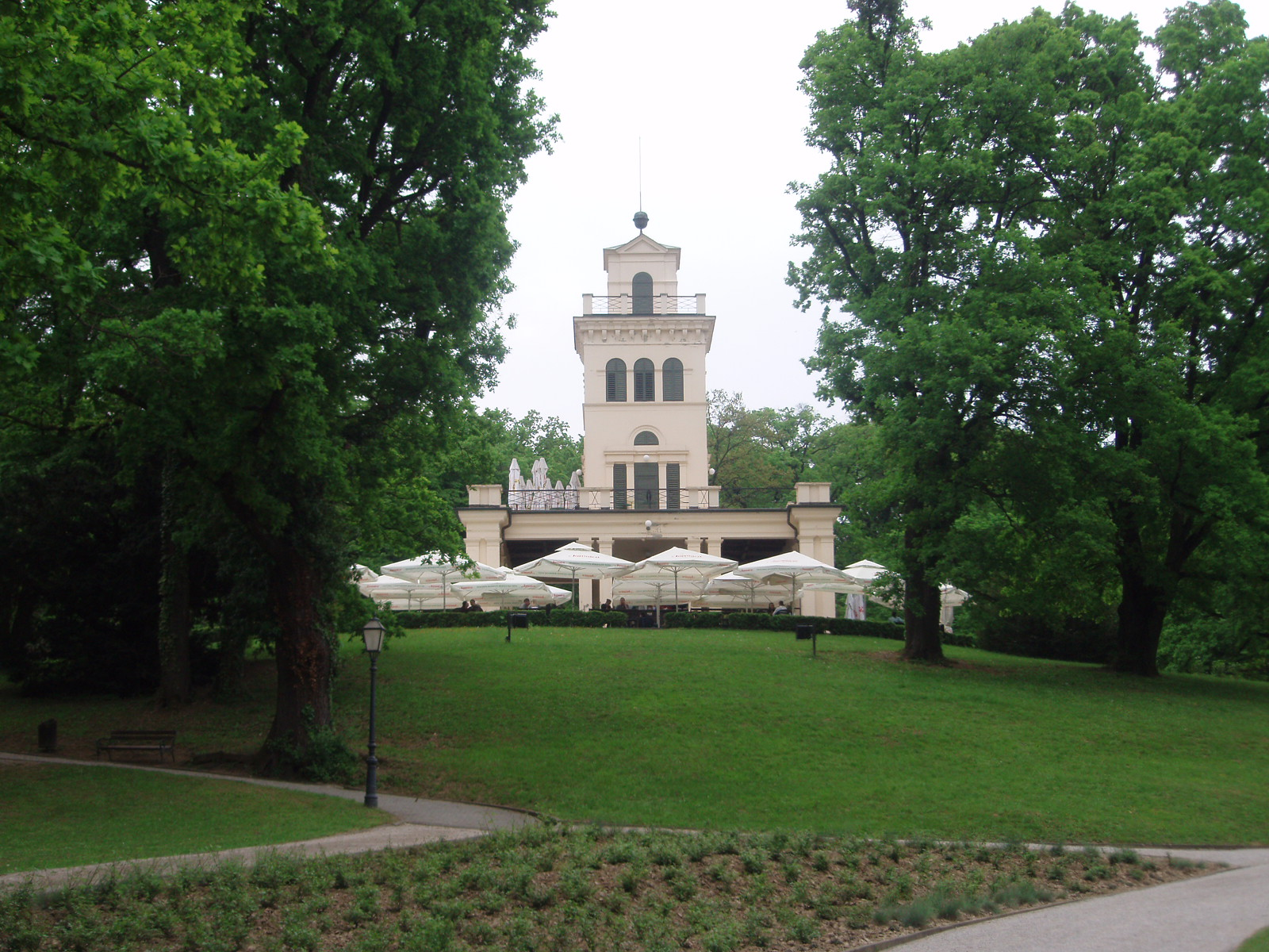 Park Maksimir